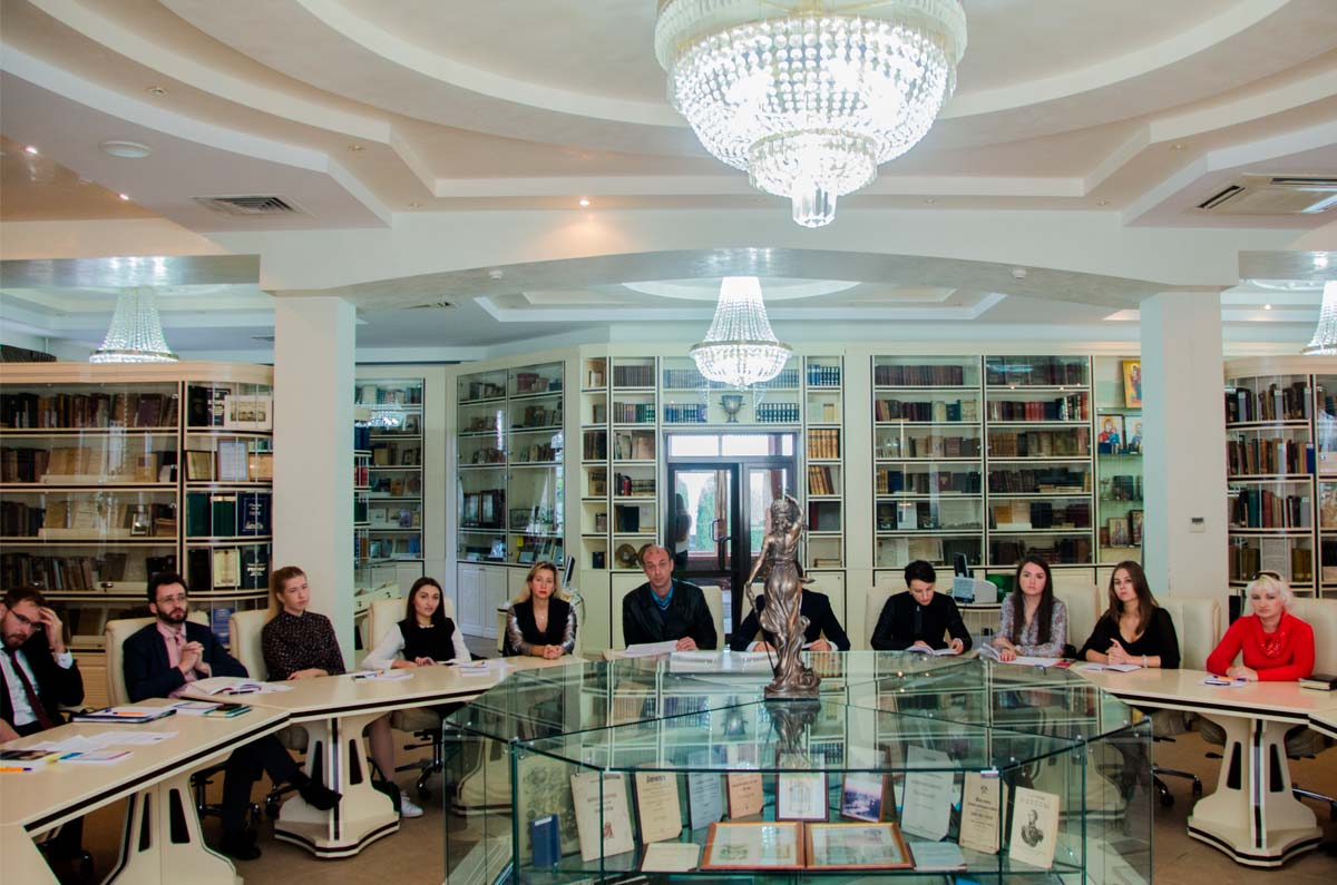 15 жовтня 2016 року у стінах відділу рідкісних видань – Музеї книги НУ «Одеська юридична академія» відбувся Міжнародний науково-практичний круглий стіл на тему: «Розвиток системи приватного права України та Польщі».